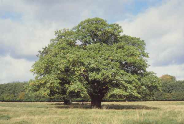 Raunkiærseg (Quercus robur), Jægersborg dyrehave